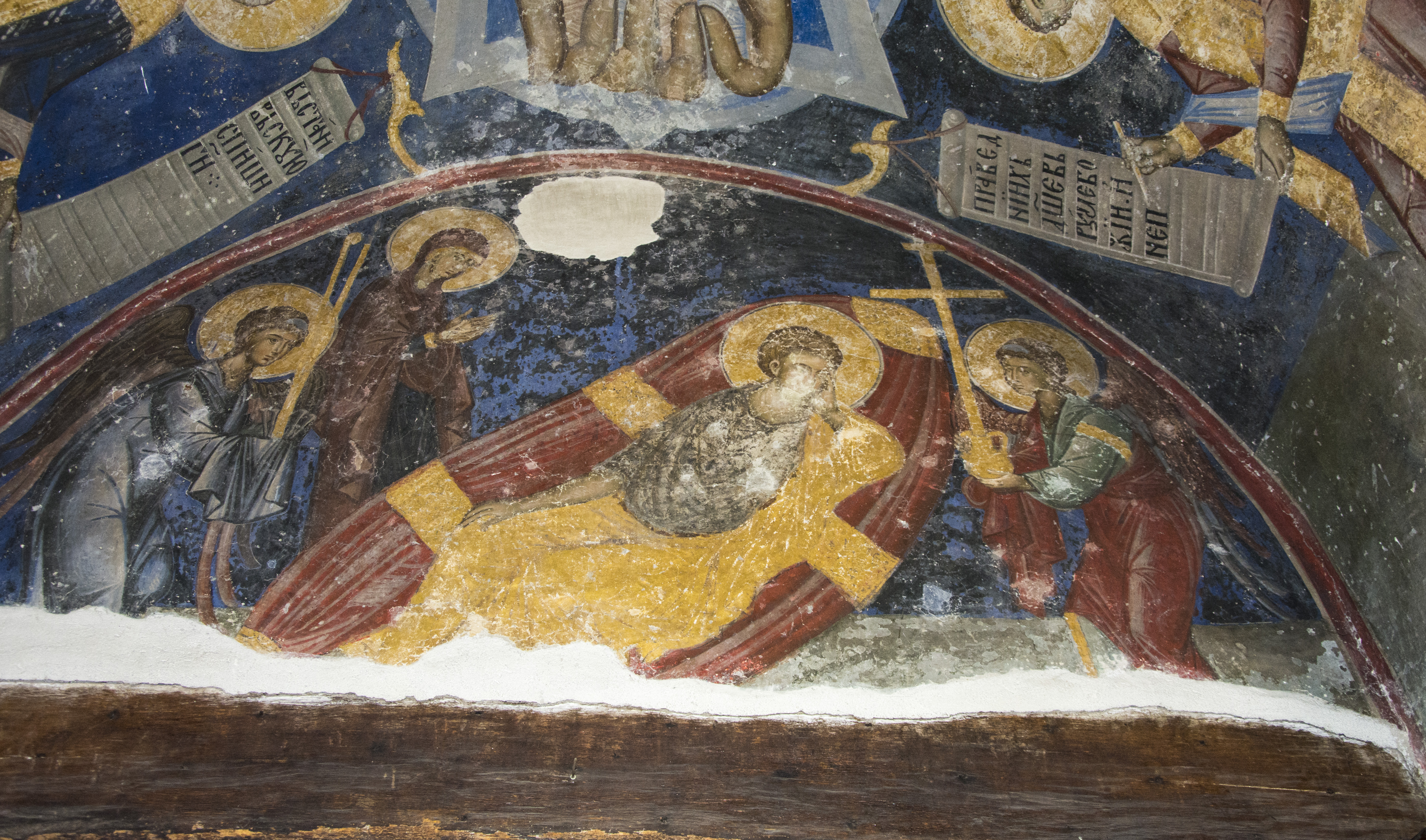 Сцена Недремано око изнад главног свода